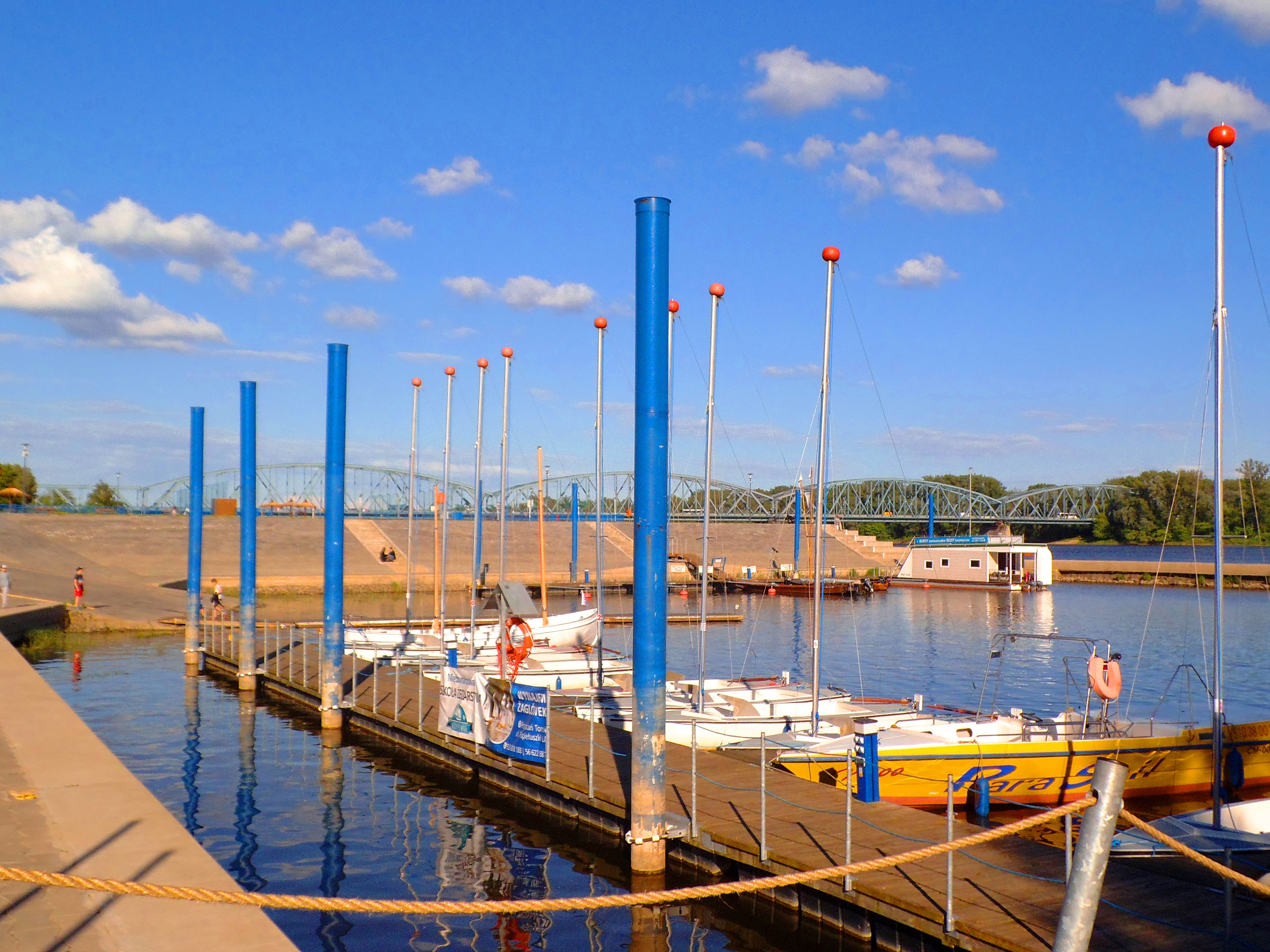 Przystań AZS w Toruniu, 2017